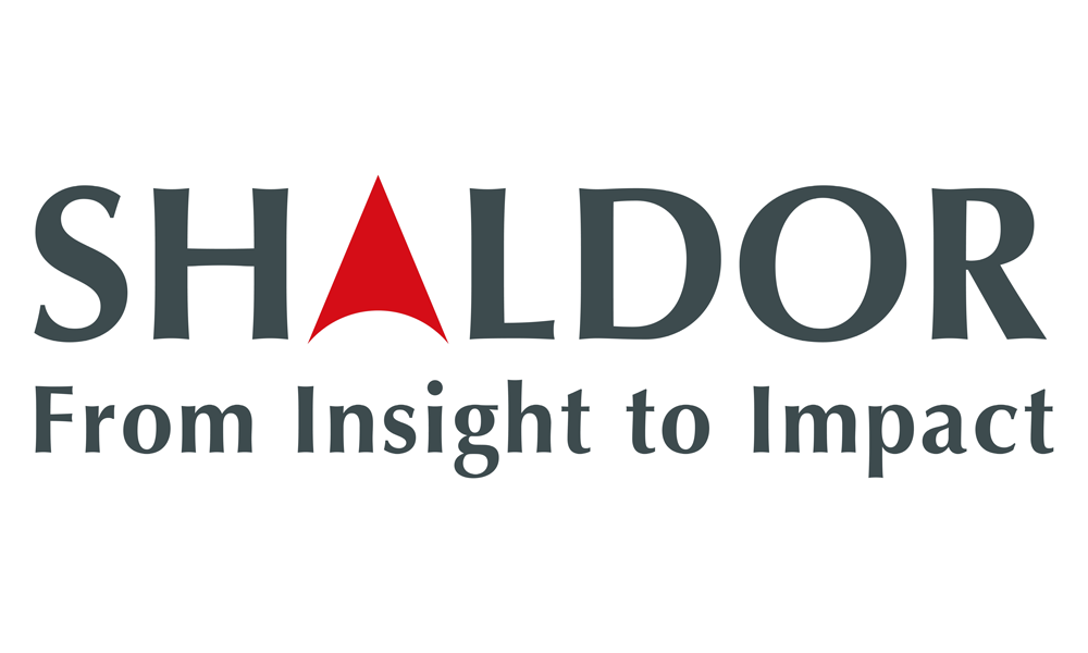 חברת שלדור בע"מ